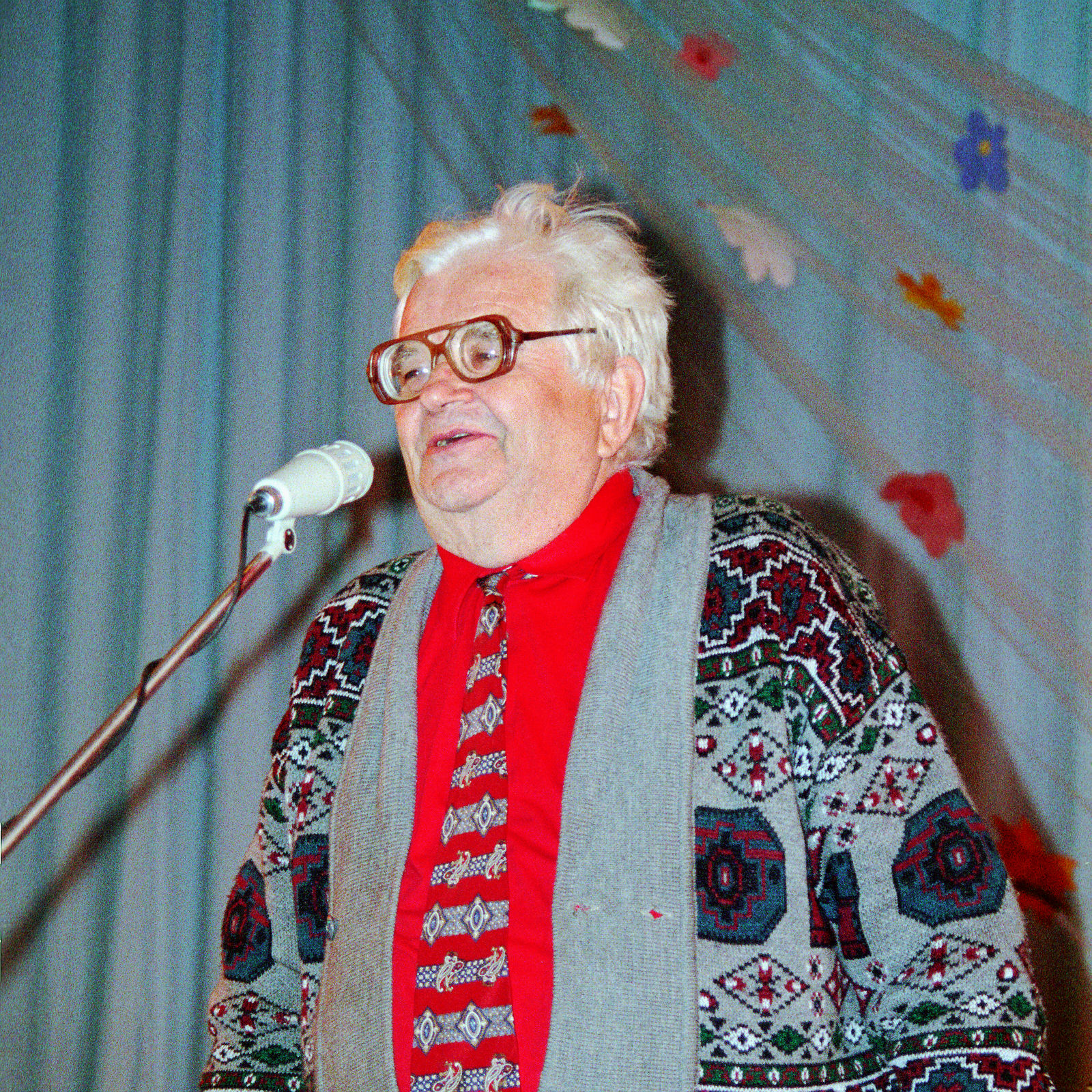 Валентин Дмитриевич Берестов (русский поэт, переводчик, мемуарист, пушкинист) выступает в культурном центре «Славич» на встрече с переславцами. Переславль-Залесский, площадь Менделеева. После встречи, разговаривая с переславскими журналистами, он сказал: «Сама окружающая действительность — древний город, удивительная природа — располагают к поэтическому мироощущению. Неудивительно поэтому, что дети читали в основном стихи о природе. Так хорошо, что на этой древней, овеянной исторической памятью земле подрастает молодое творческое поколение: дети сами сочиняют стихи, загадки. И это прекрасно».